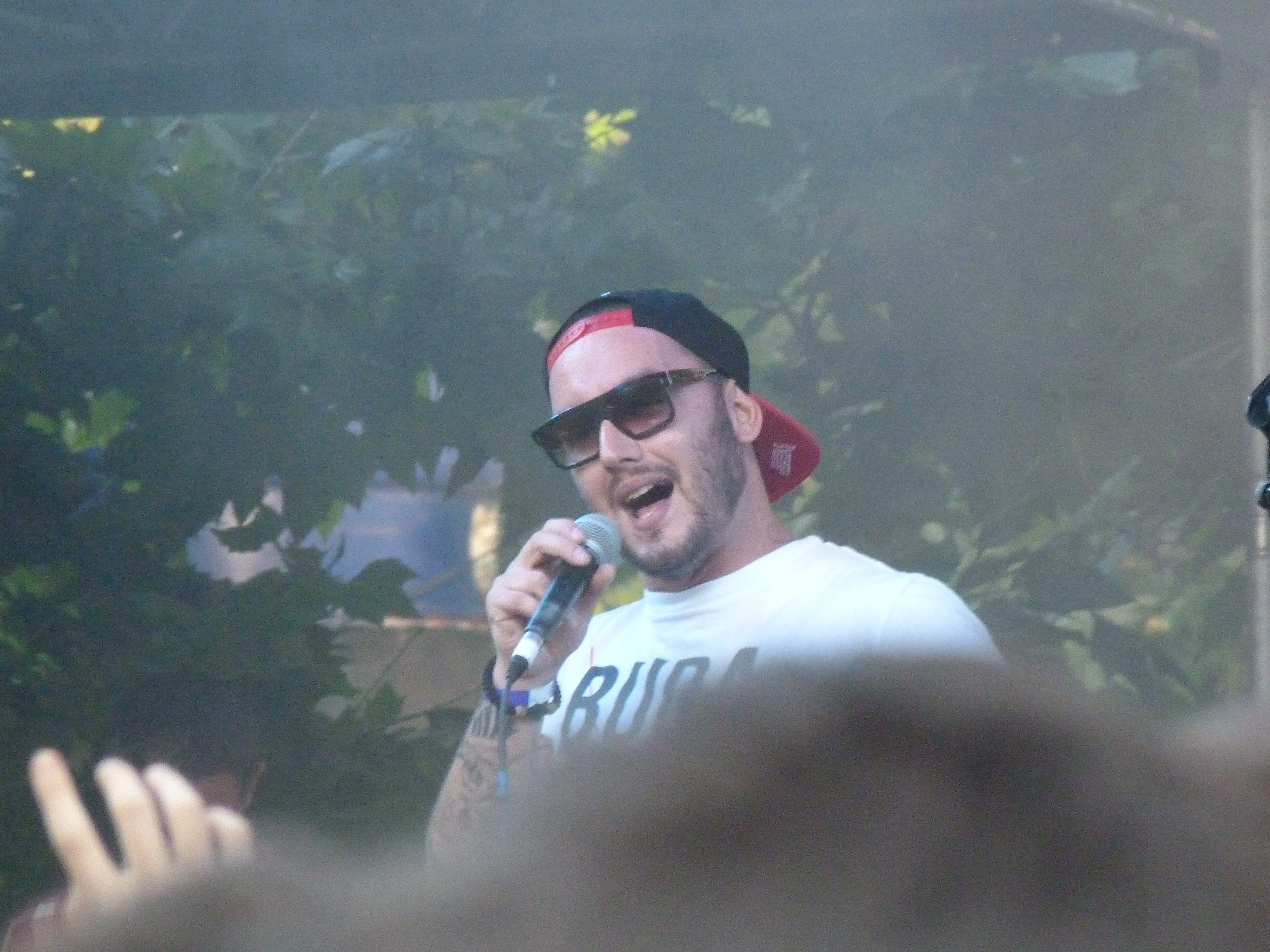 A felvétel 2013. Június 9 –én készült Budapesten, a Szabadság téren. Belvárosi Fesztivál. A Punnany Massif hip-hop zenekar. Négy lemezük jelent meg: 2006-ban a Körkorkép, 2010-ben a ShenKick, 2011-ben a SunKick, illetve 2013-ban a Fel#1. ©© Megjelent Creative Commons alatt a Metapolisz sorozatban. A Metapolisz sorozat valamennyi képe és filmje Creative Commons alatti valamint kereskedelmi - for profit - célra is felhasználható. Ajánlott hivatkozás: Derzsi Elekes Andor: Metapolisz DVD line ©© Published under Creative Commons in the Metapolisz DVD line. All of the photos and vids in the Metapolisz DVD line are under Creative Commons and can be used even for commercial – for profit – purposes. Recommended Citation Derzsi Elekes Andor: Metapolisz DVD line